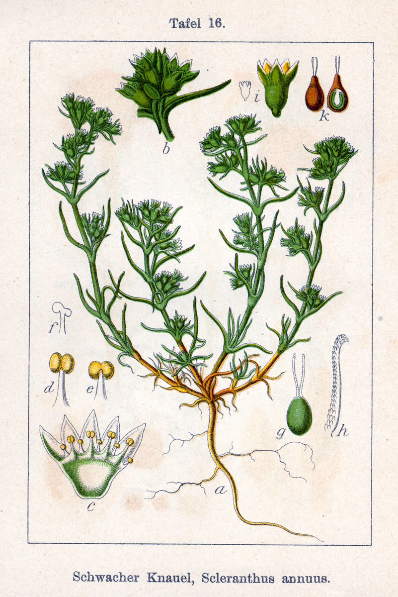 Scleranthus annuus L. Original Description Schwacher Knauel, Scleranthus annuus